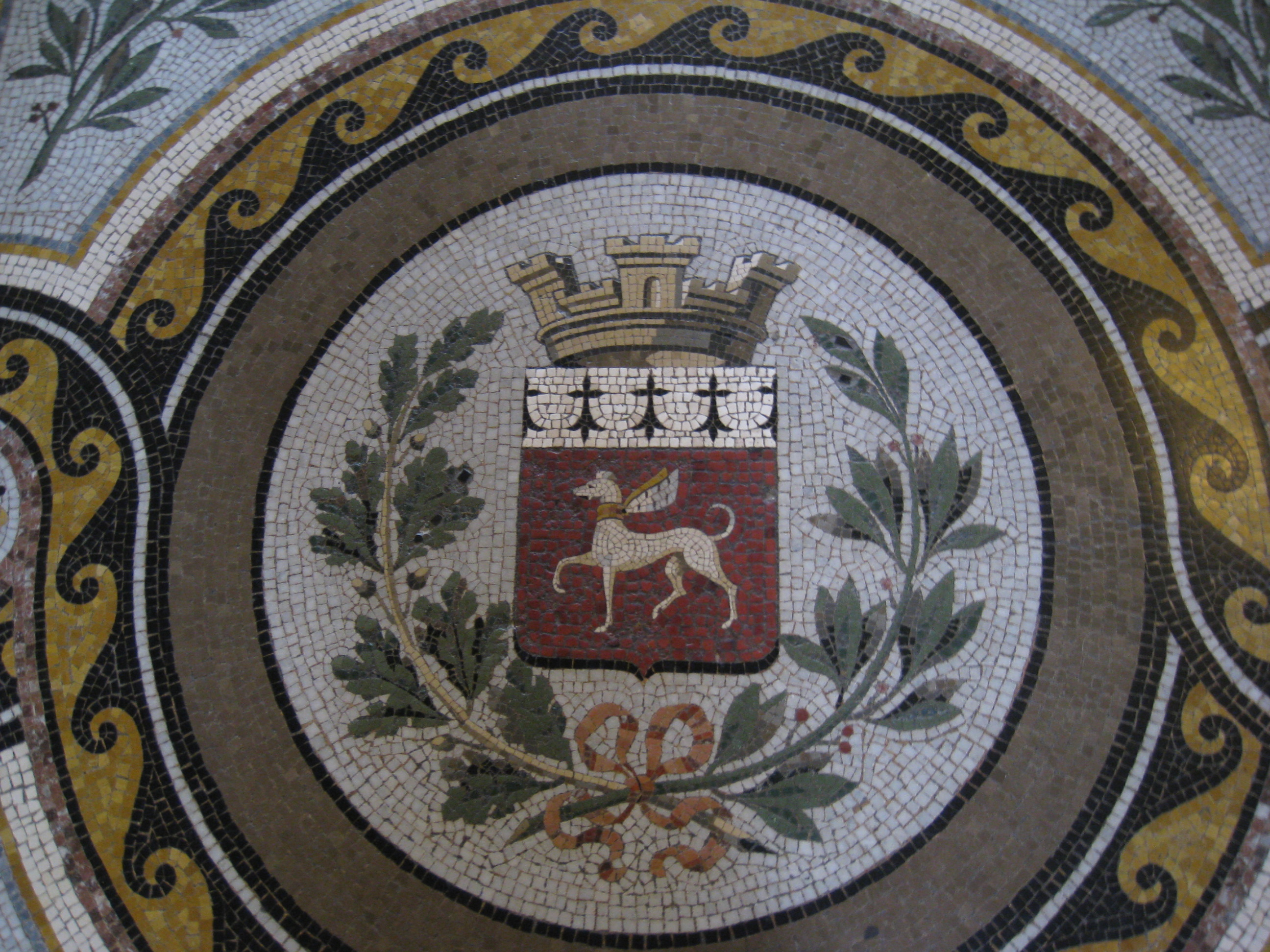 Hôtel de Ville - Mosaique représentant une version erronée du blason de Vannes